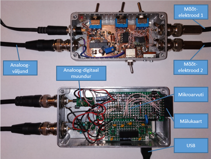 Puidu niiskusmõõturi prototüüp üle puidu kiu küllastuspunkti niiskussisalduste mõõtmiseks.